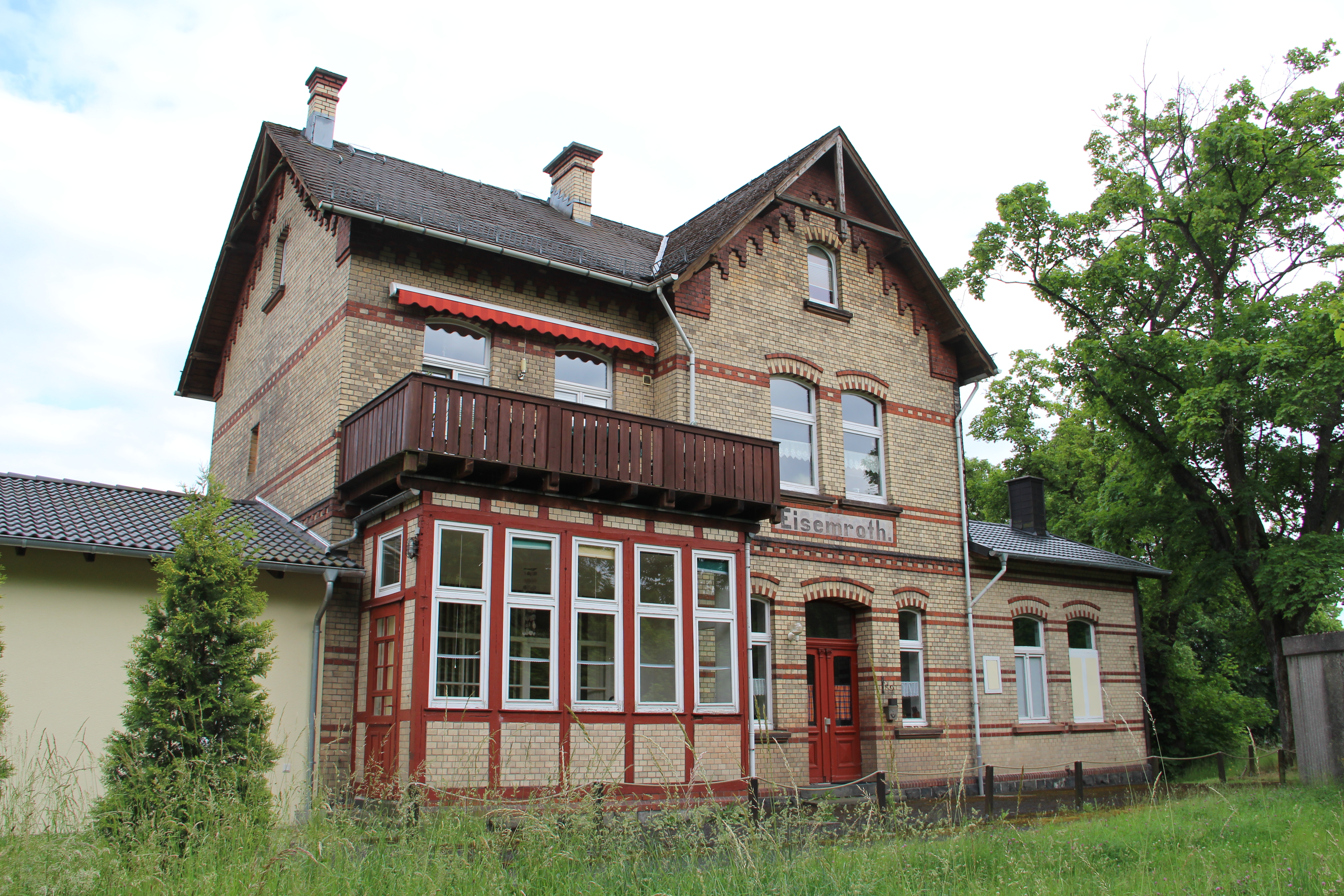 Ehemaliger Bahnhof von Eisemroth